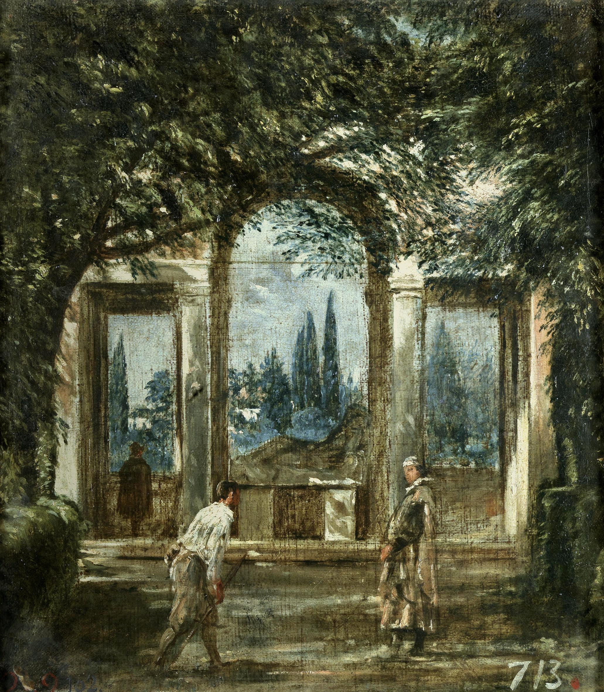 La obra representa el jardín de la Villa Médici de la ciudad de Roma, (Italia).